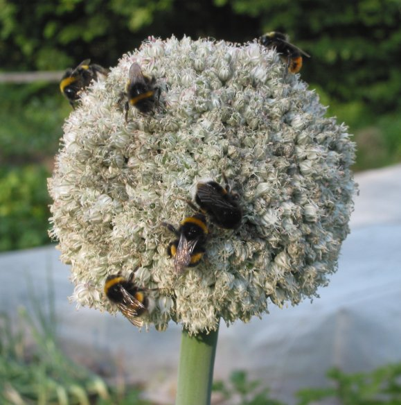 zelfgemaakte foto van hommels op prei; half juli